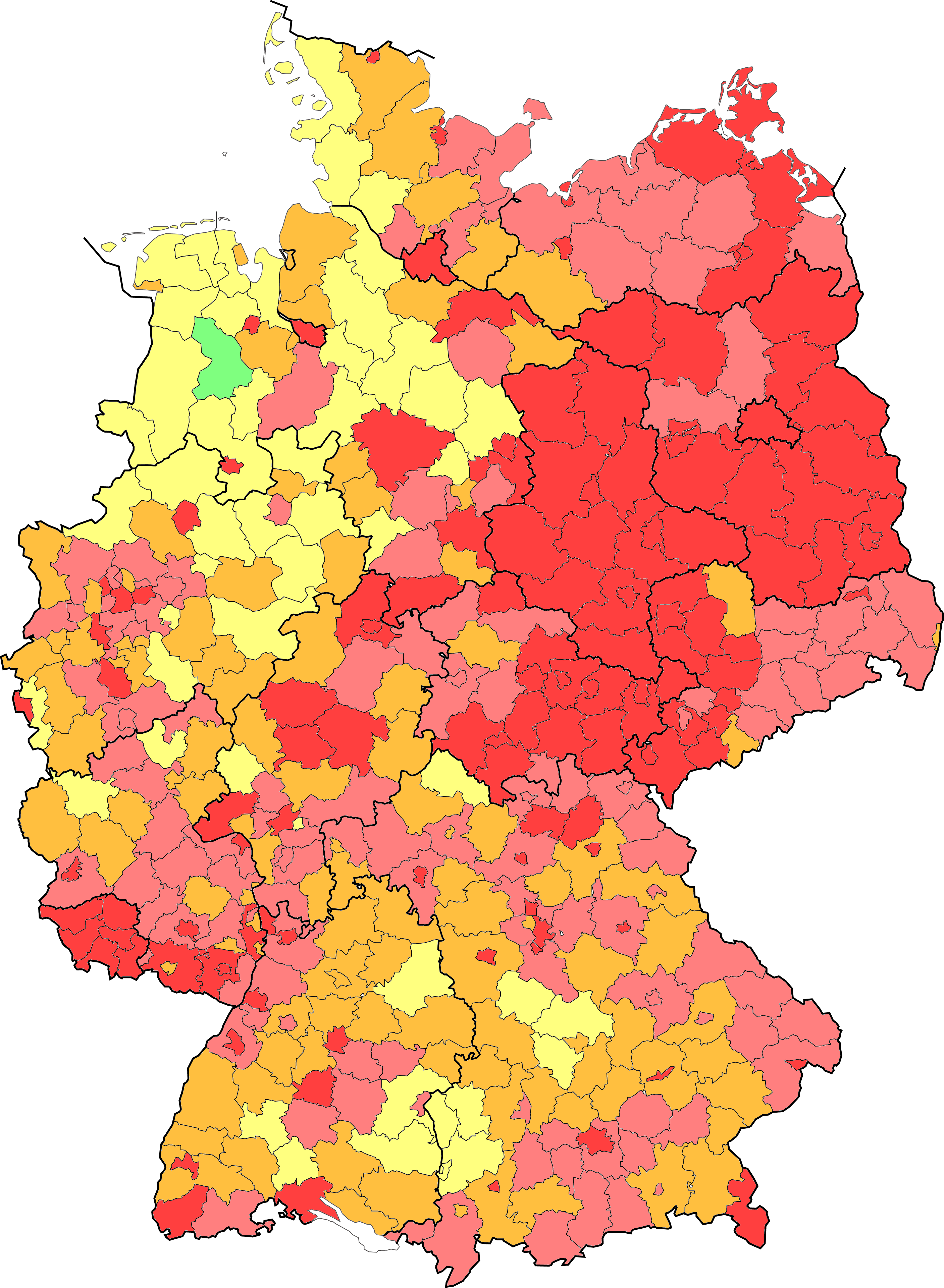 Geburtenrate im Sinne der Kinderzahl je Frau im Jahr 2003 bezogen auf die Landkreise im Juli 2007